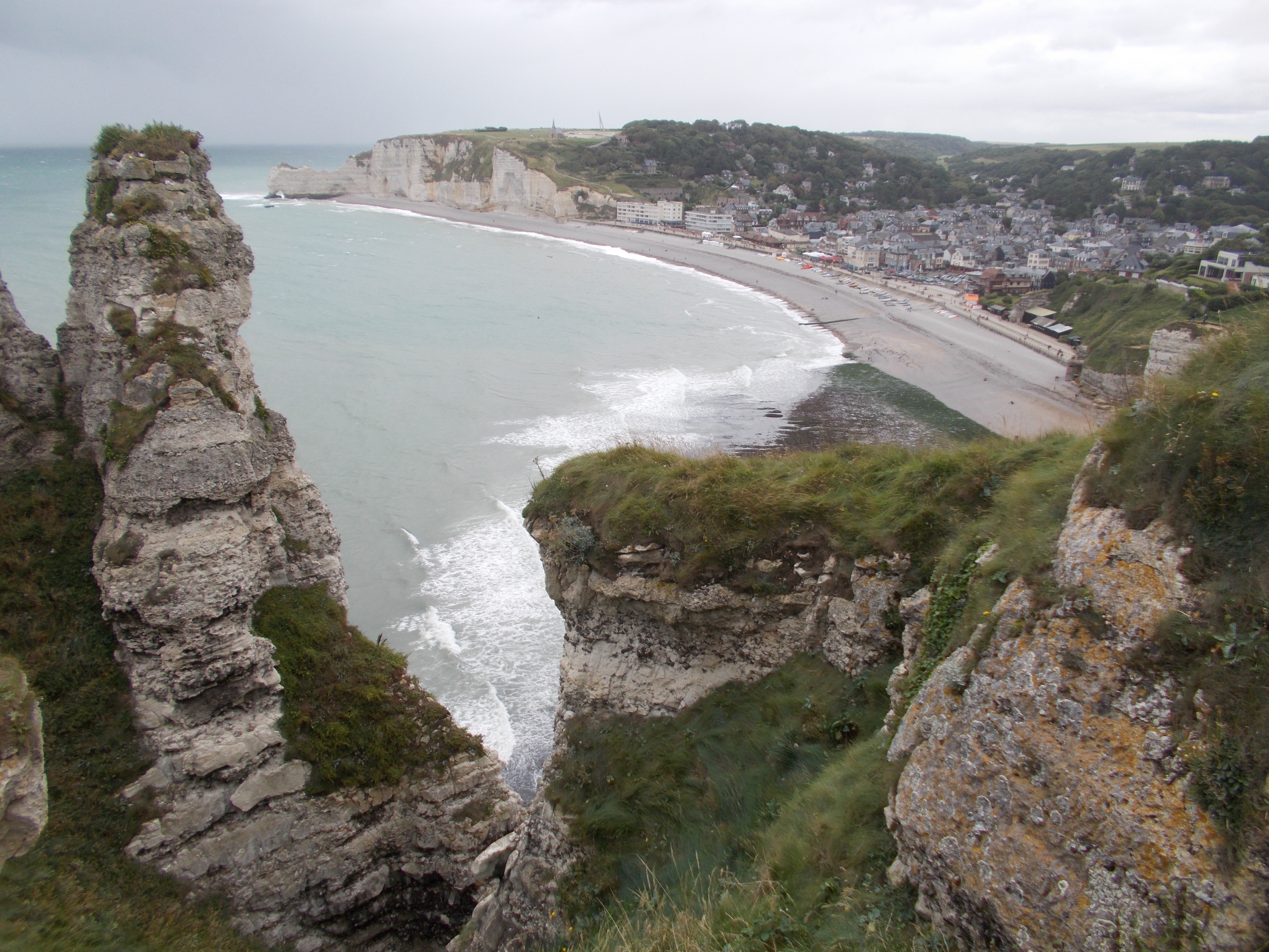 Etretat!